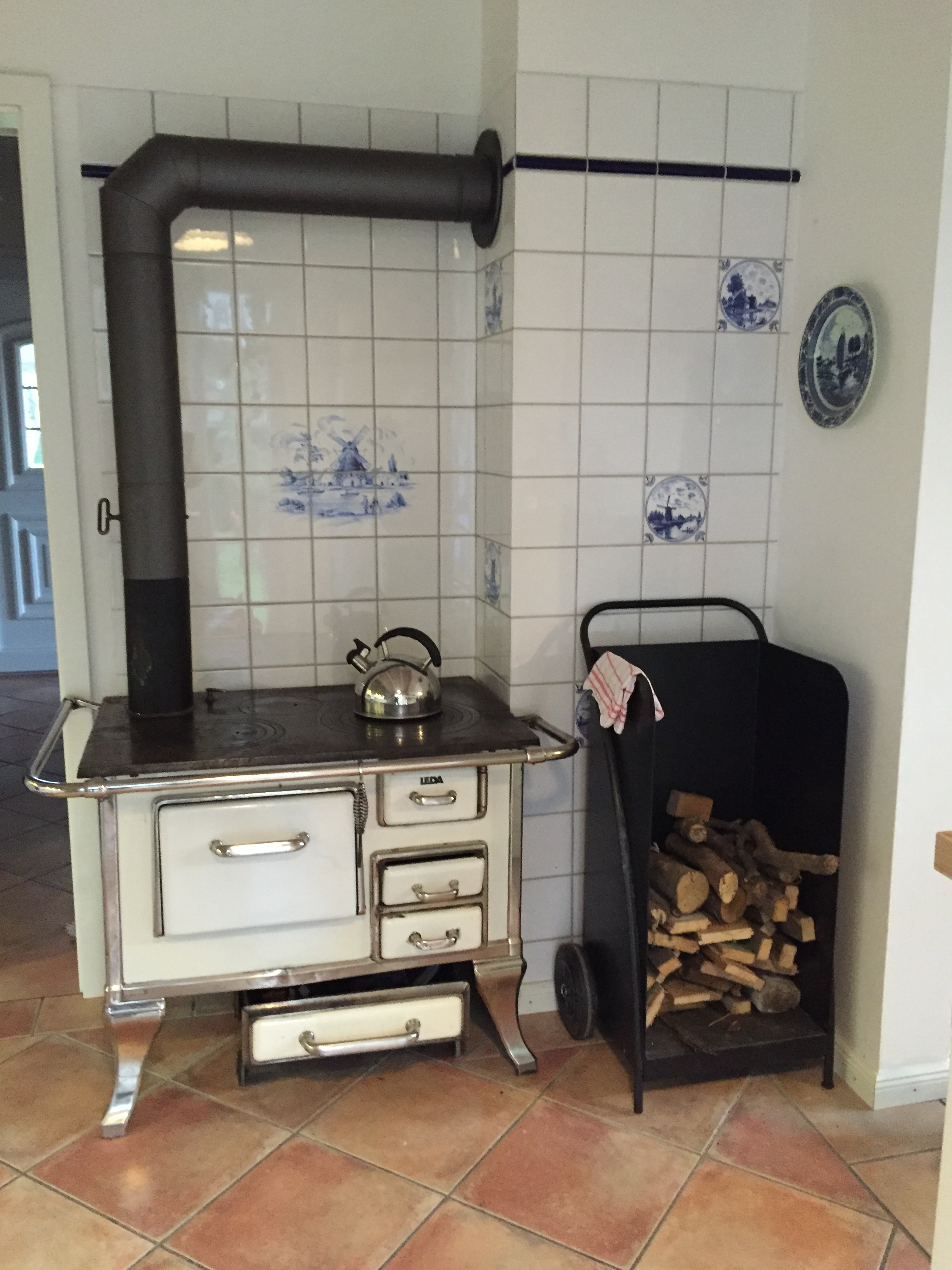 Stangenofen in Gebrauch